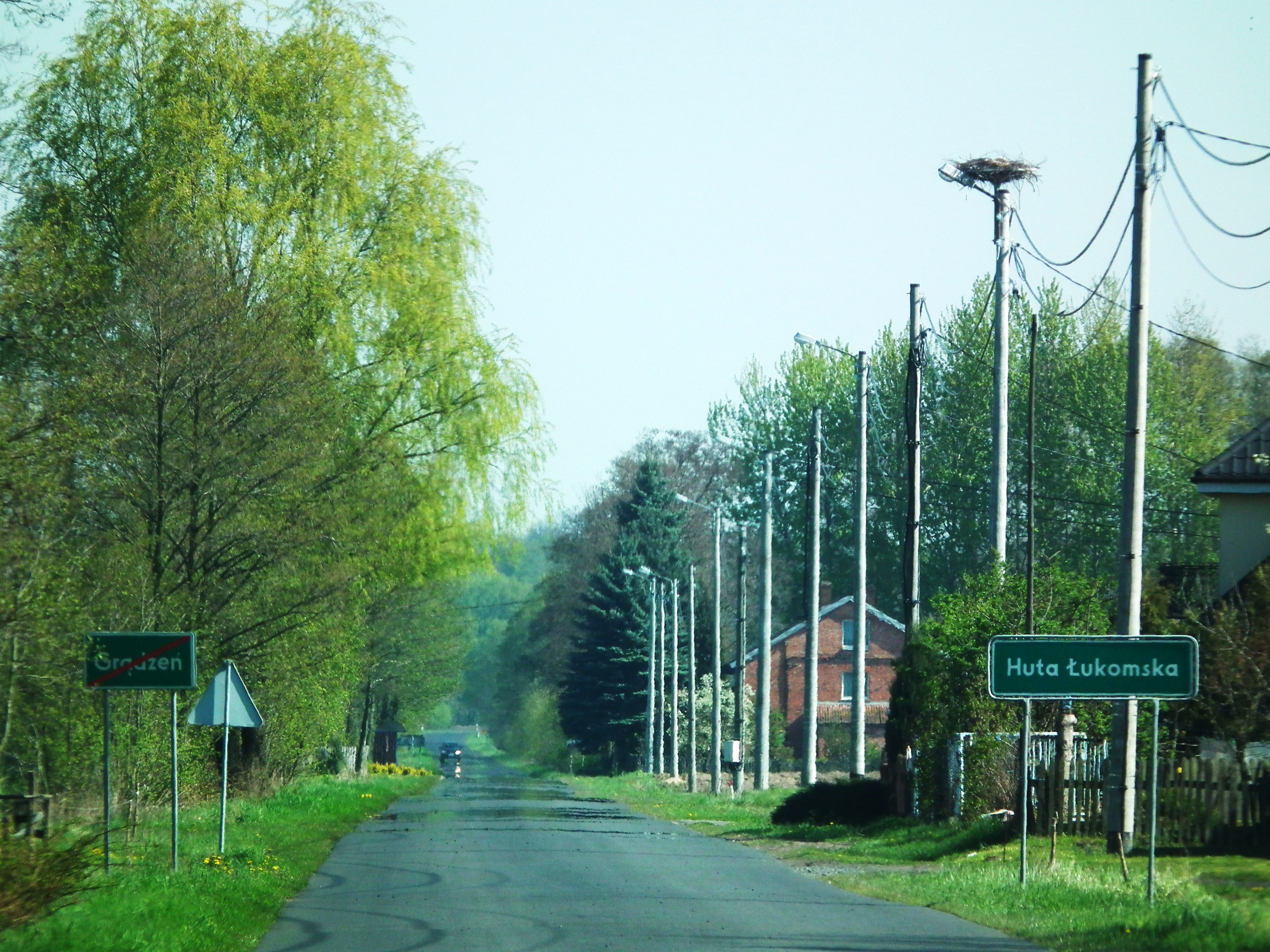 Huta Łukomska - gł. ulica.